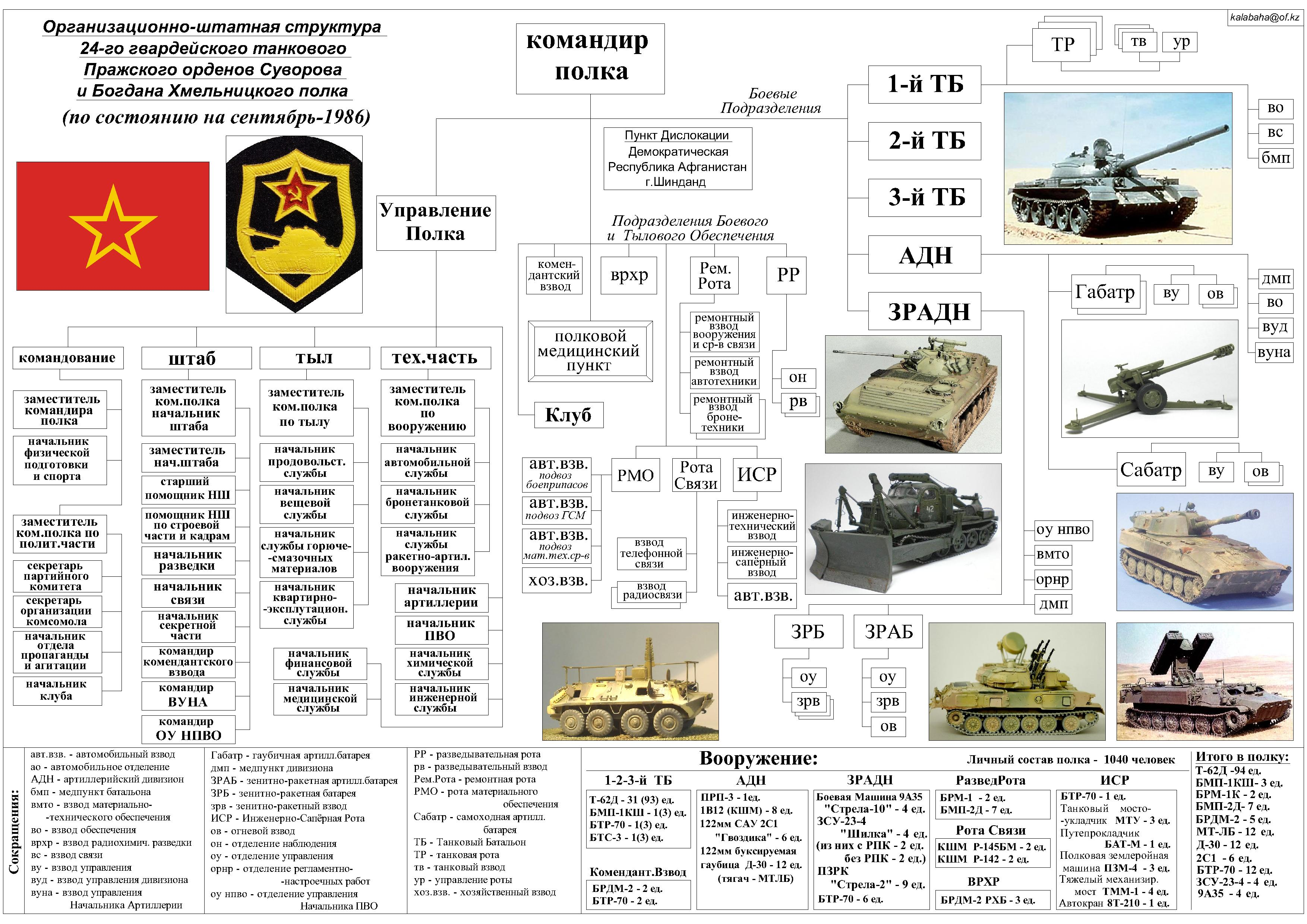 Организационно-Штатная Структура 24-го гвардейского танкового полка 5-й гв.мсд на сентябрь-1986. Собственная работа на основе данных взятых с сайта 24-го гв.тп а также с сайта 5-й гв.мсд .